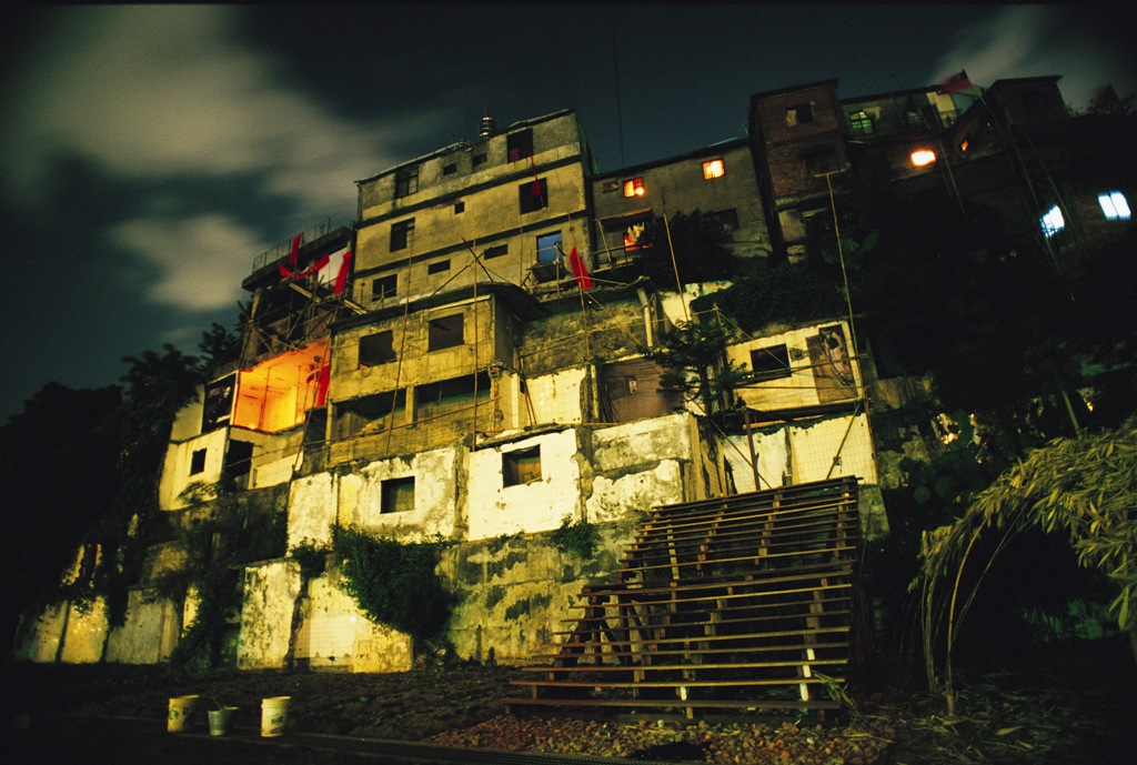 Treasure Hill, Taipei, Taiwan. Marco Casagrande. Ecological urban rehabilitation realization, 2003.